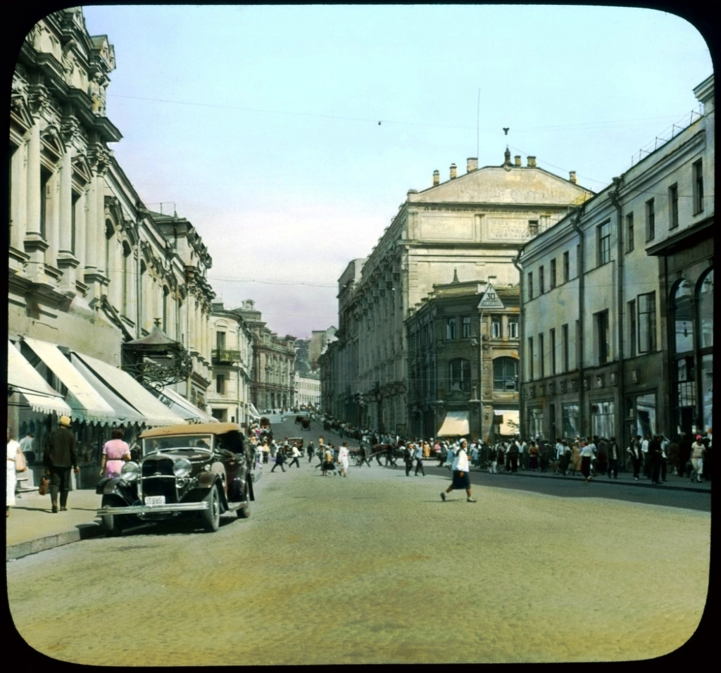 Москва. Улица Кузнецкий Мост